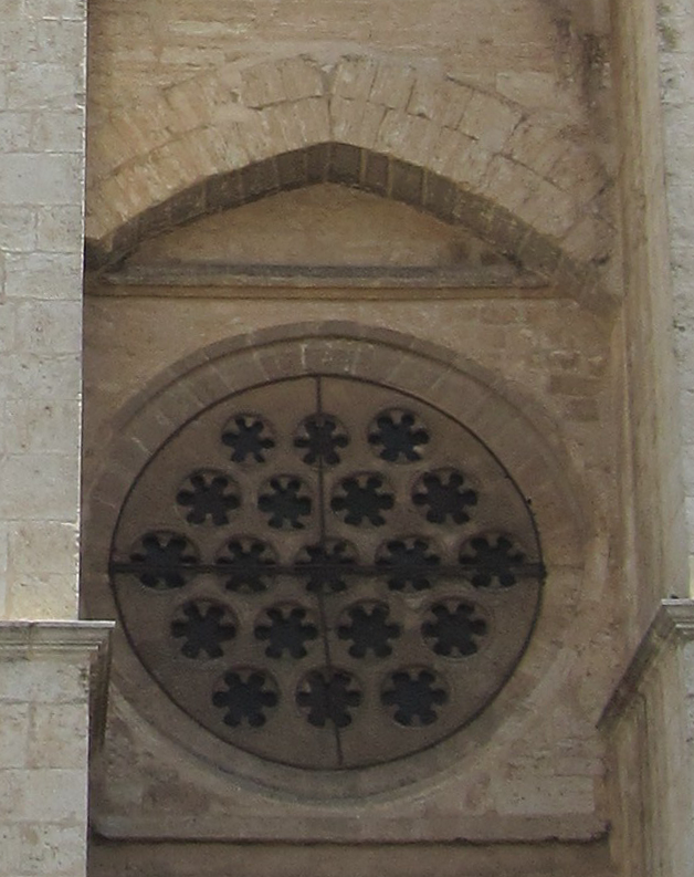 Rosetón sobre la puerta del Perdón de la Catedral de Santa María del Prado de Ciudad Real (España), del siglo XV.